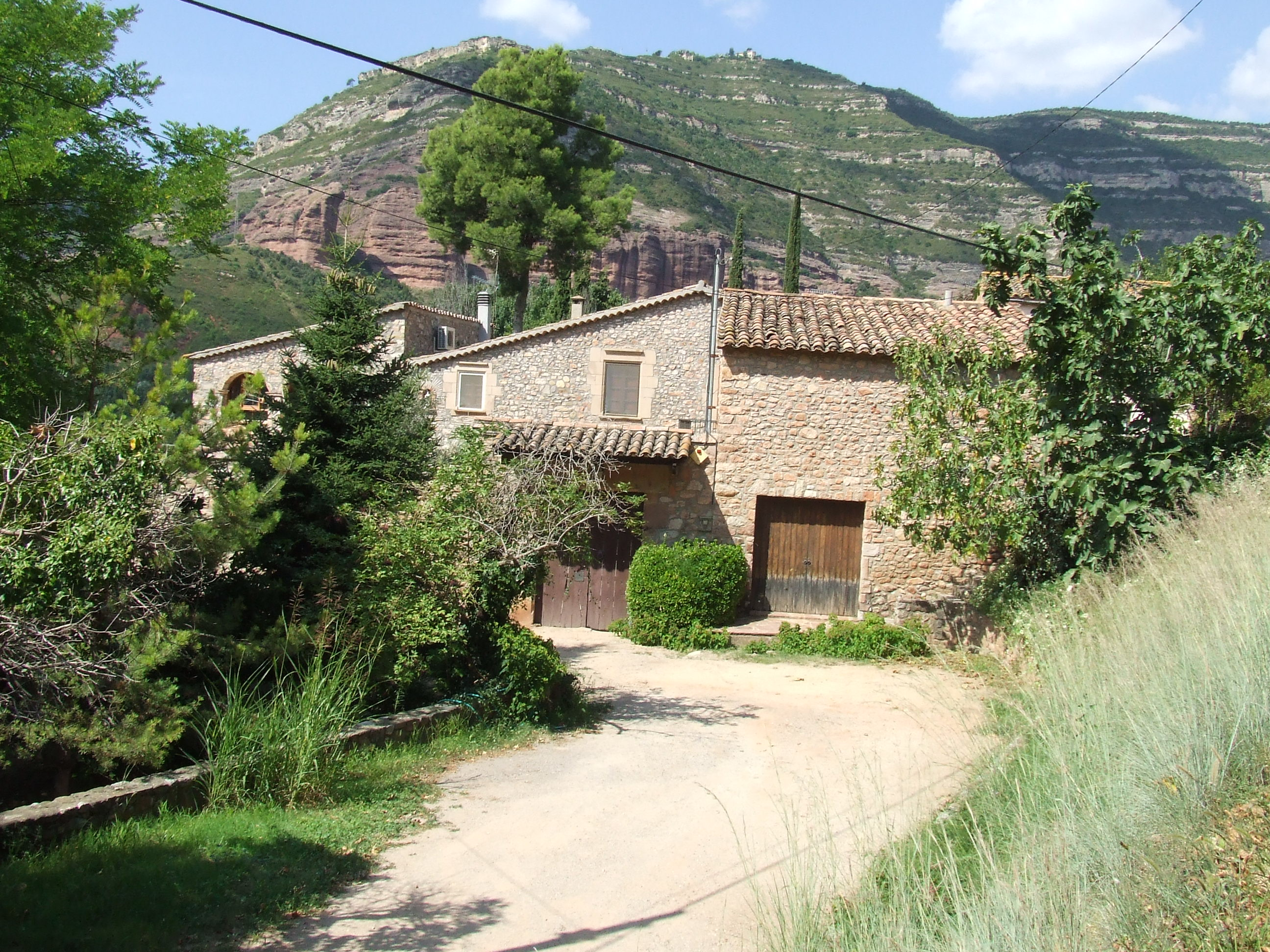 El Regassol (Riells del Fai, Bigues i Riells, Vallès Oriental)